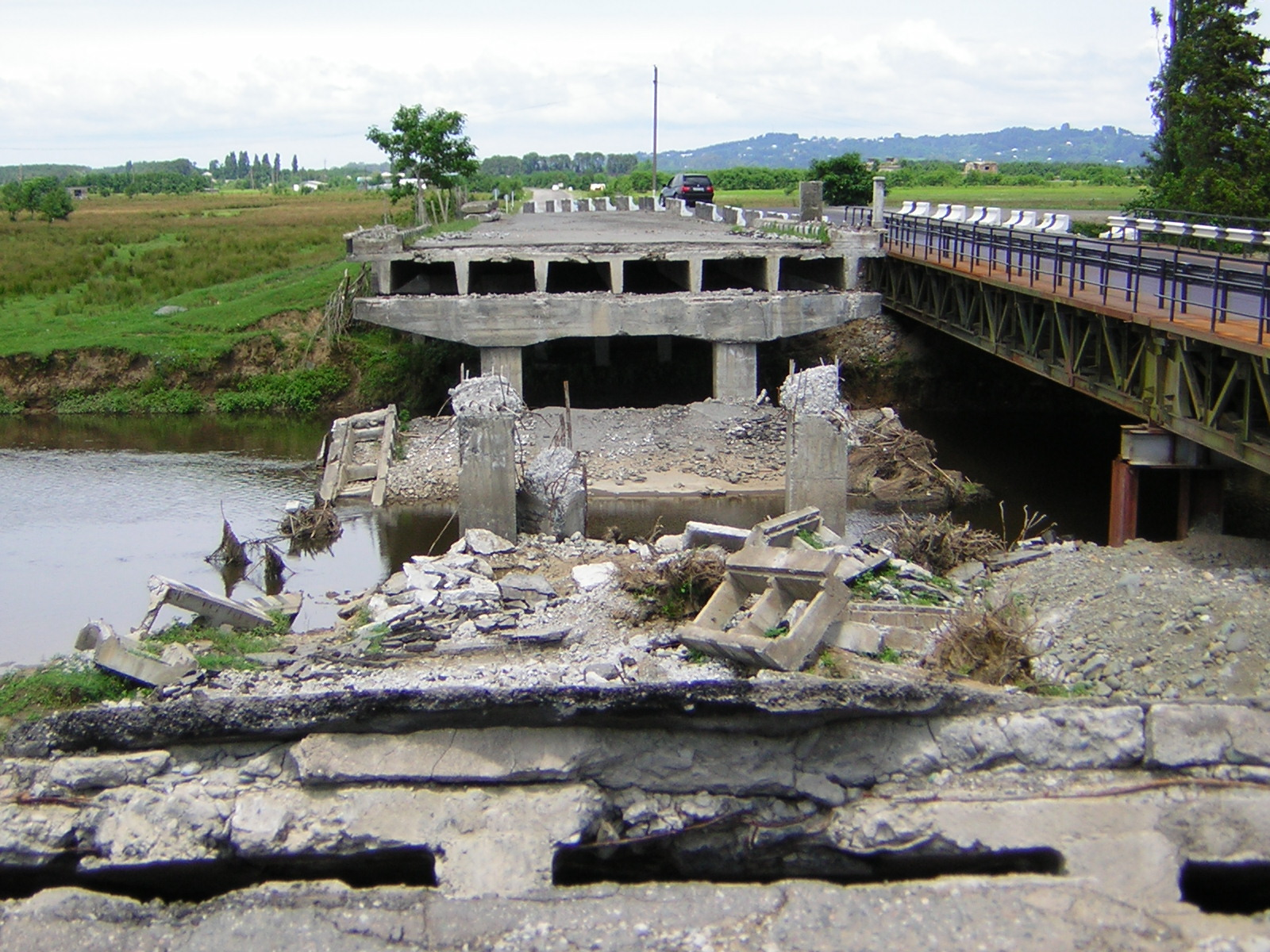 Verwoeste brug over de Tsjoloki. Eigen werk, gemaakt op 4 juli 2004. cc-by-sa-2.5 Bridge over the Choloko blown up during the 2004 Adjara crisis